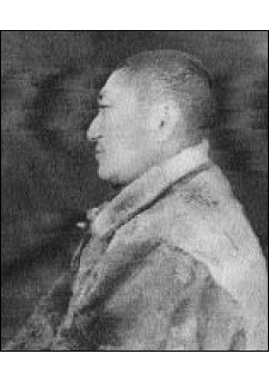 Василий Горохов (Чыычаах)